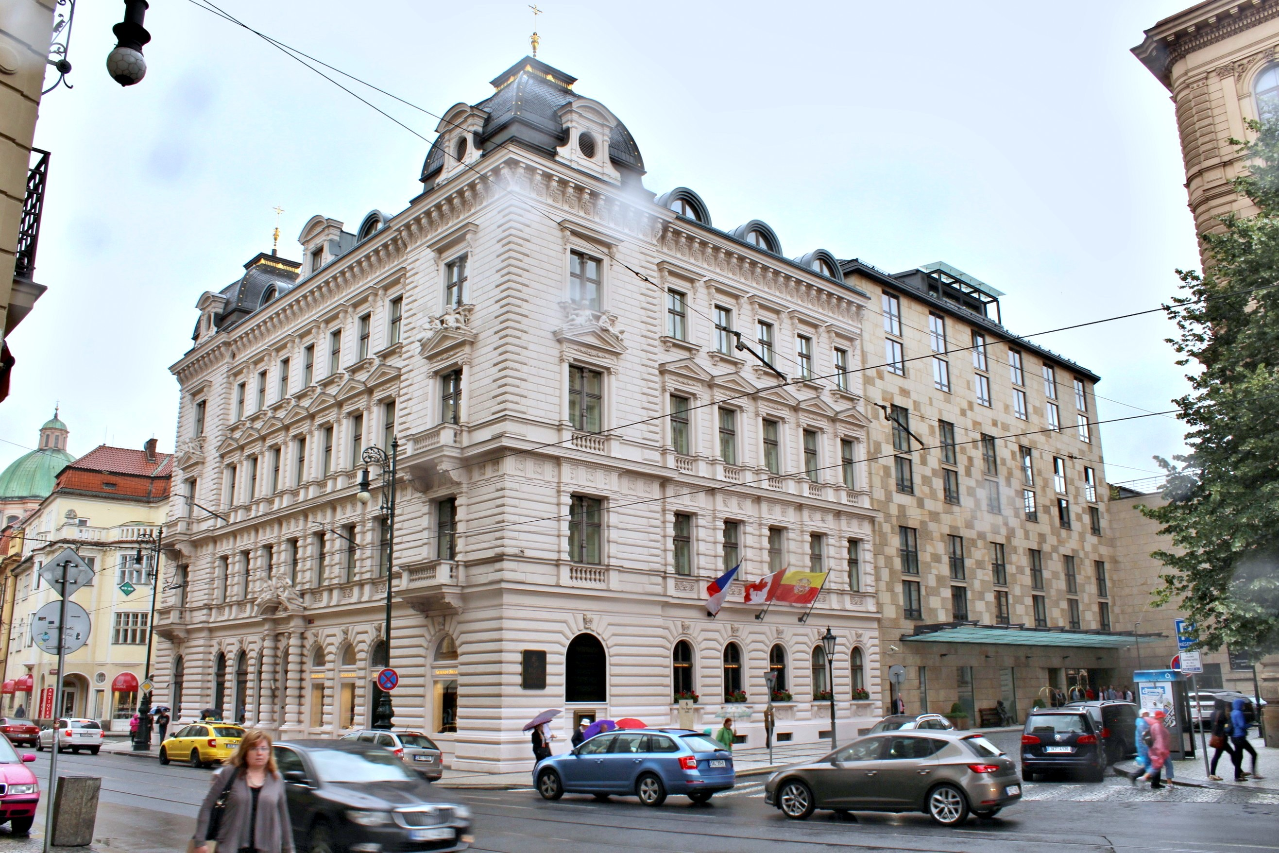 Four Seasons Hotel Praha